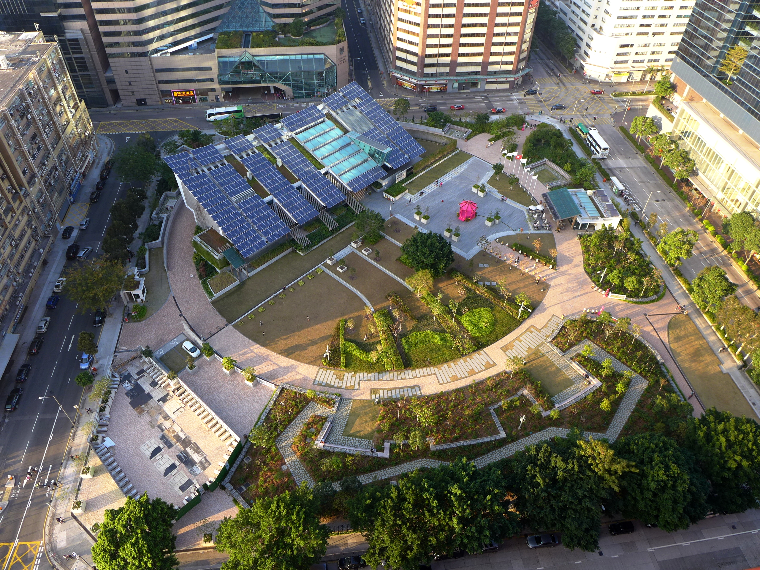 CIC Zero Carbon Building